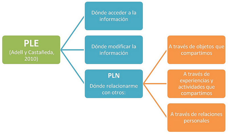 3 elementos primordiales en un PLE